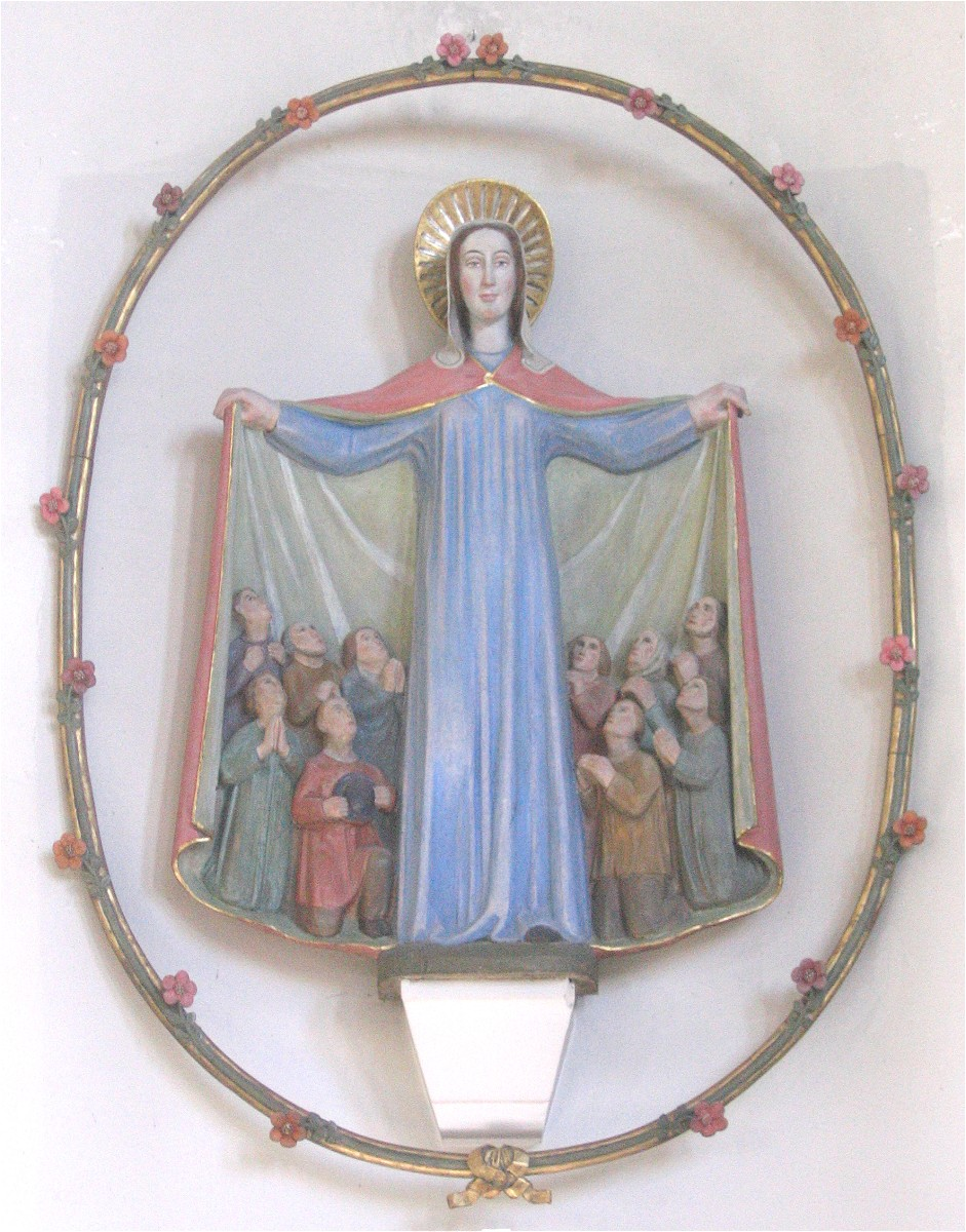 St. Korbinian in München, Schutzmantelmadonna